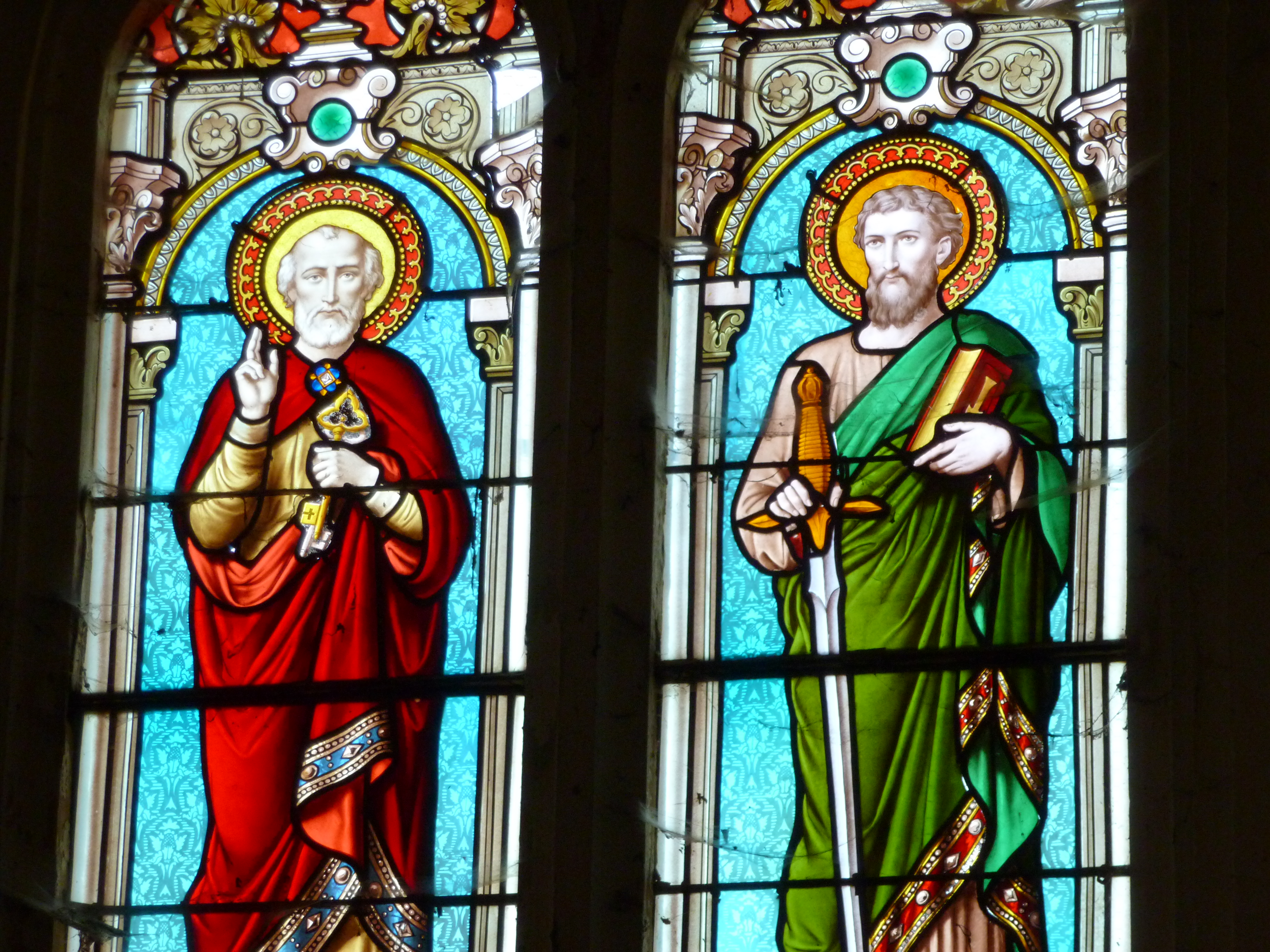 Vitrail de l'église de Connage (Ardennes, France)